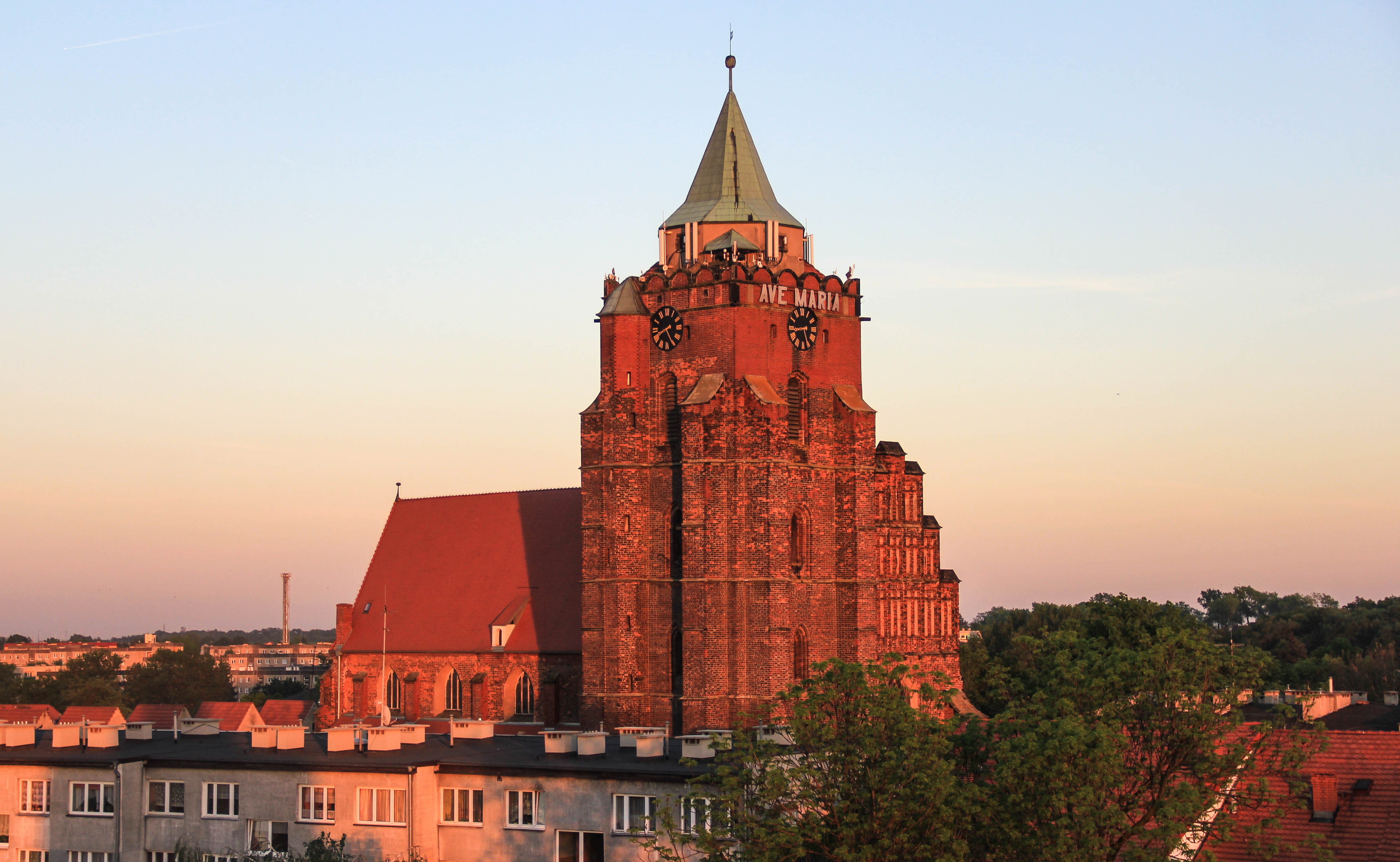 Kościół pw. św. Apostołów Piotra i Pawła w Chojnowie. Widok ze szczytu Baszty Tkaczy